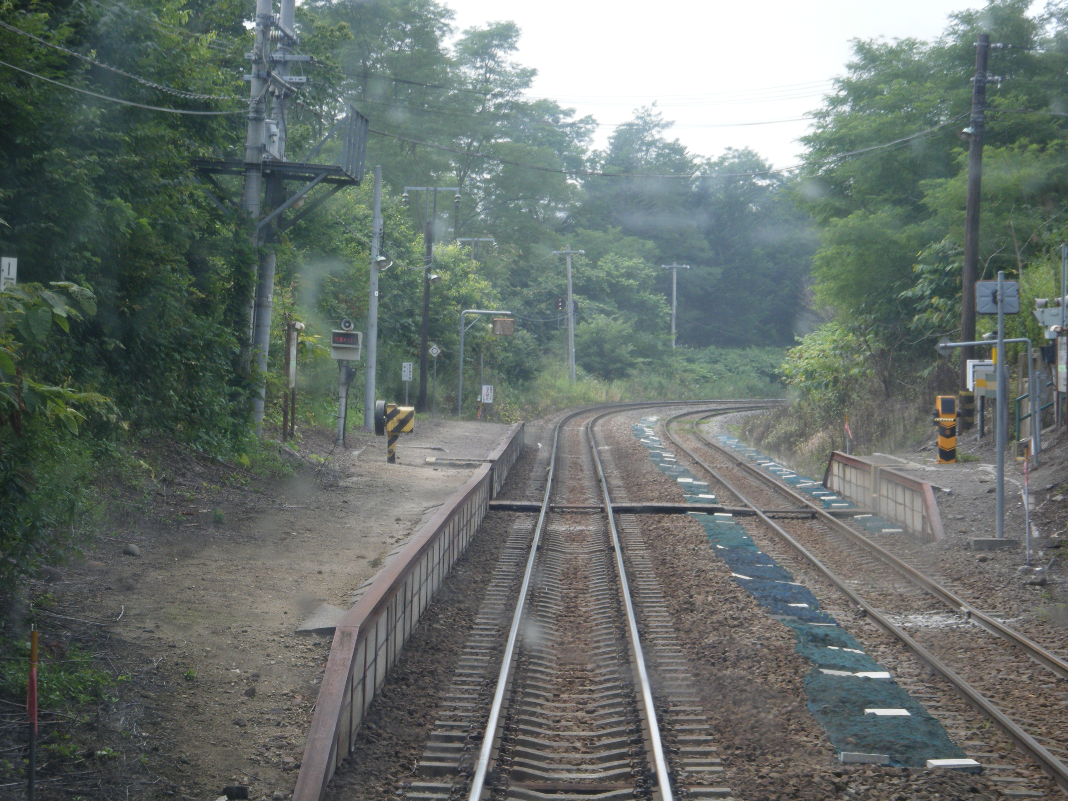 姫川駅構内。スーパー北斗車内より撮影。